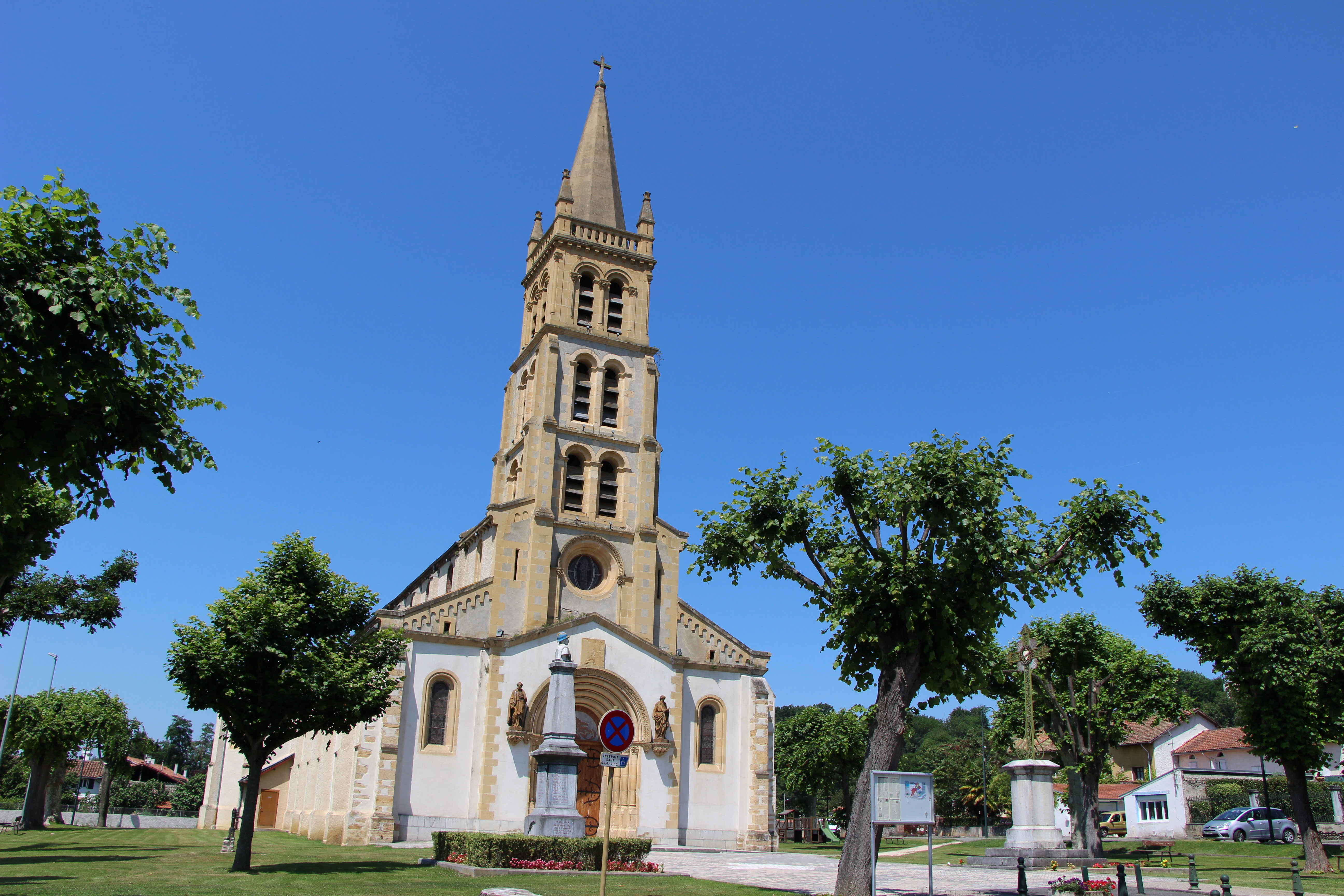 Eglise de Villeneuve de Rivière